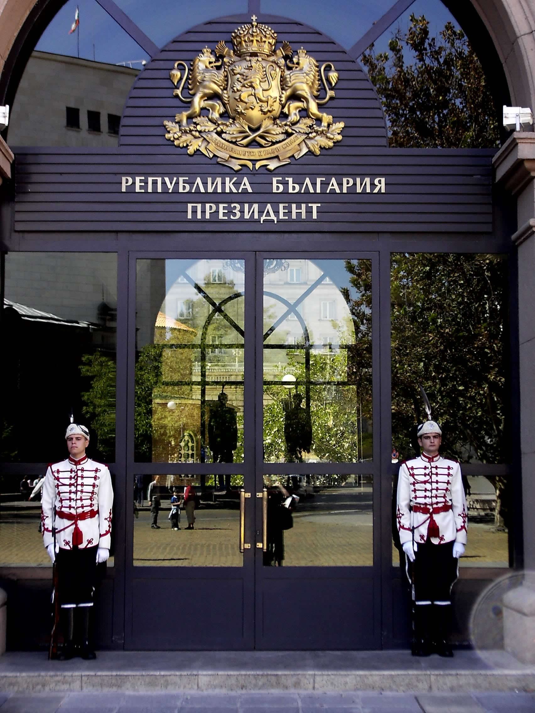 Гвардейците пред българското президетство, София, България